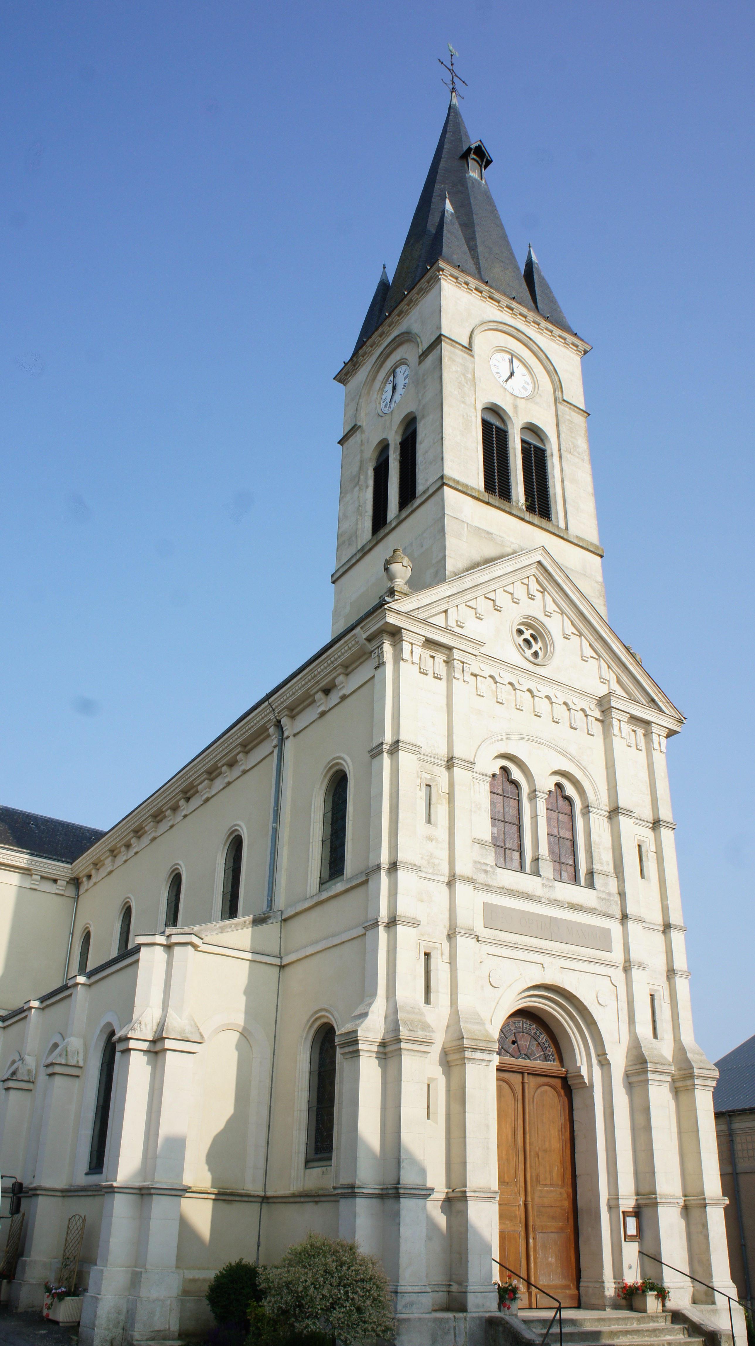 Vue de l'église.